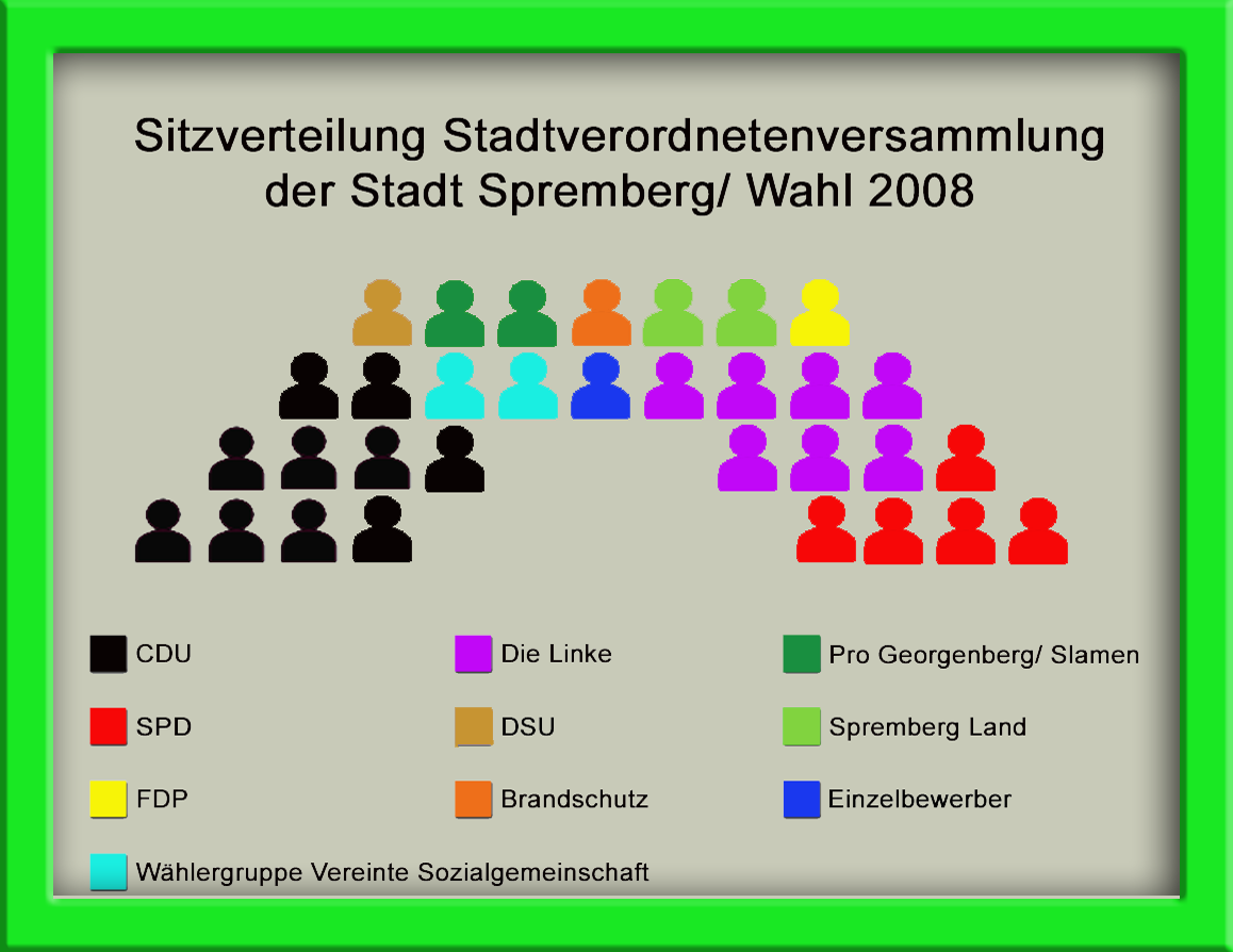 Zusammensetzung der Stadtverordnetenversammlung der Stadt Spremberg, Kommunalwahl 2008